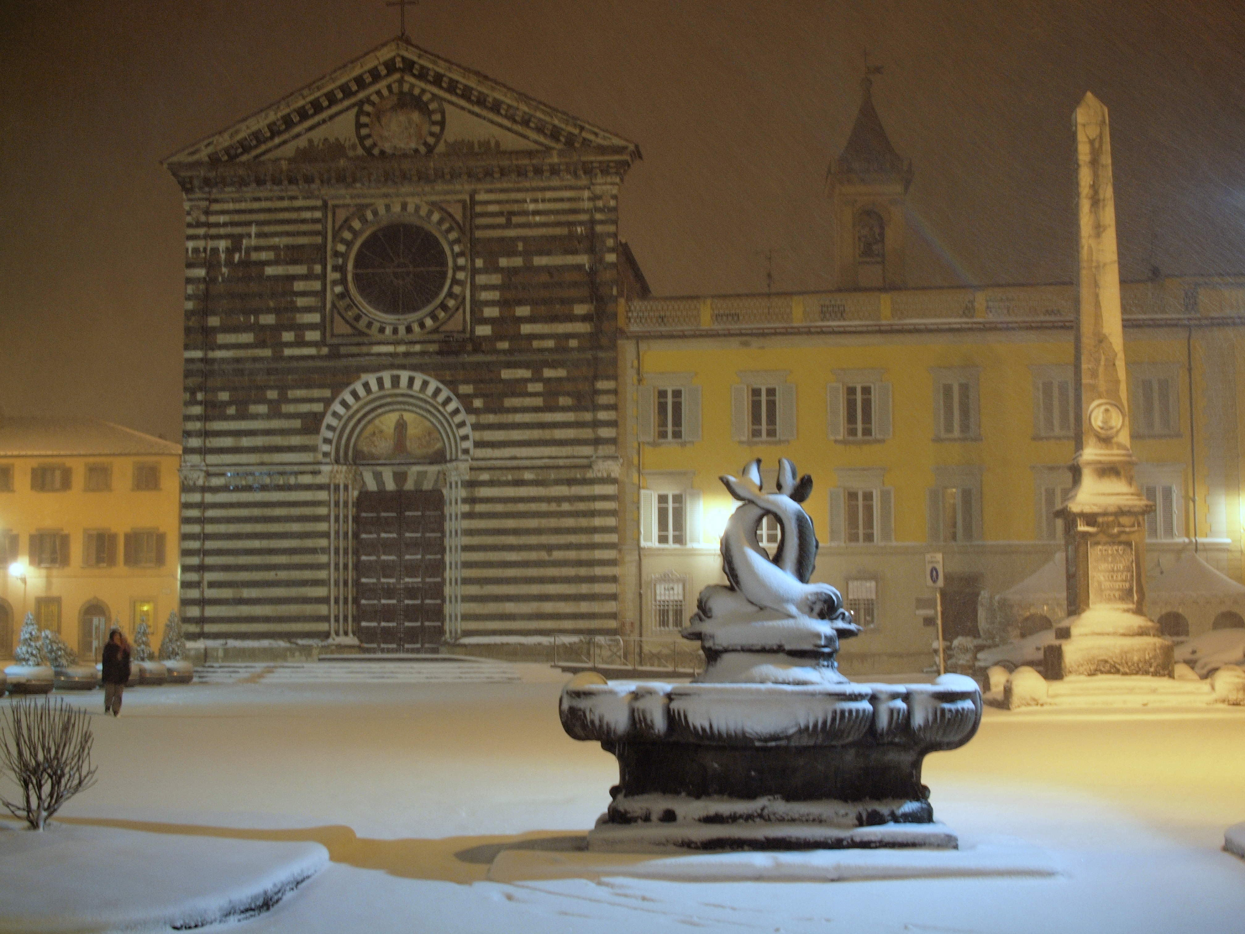 Piazza S. Francesco This is a photo of a monument which is part of cultural heritage of Italy.